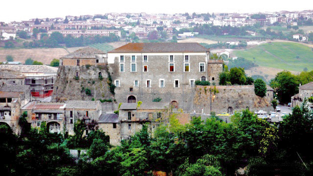 Apice (BN), il castello normanno